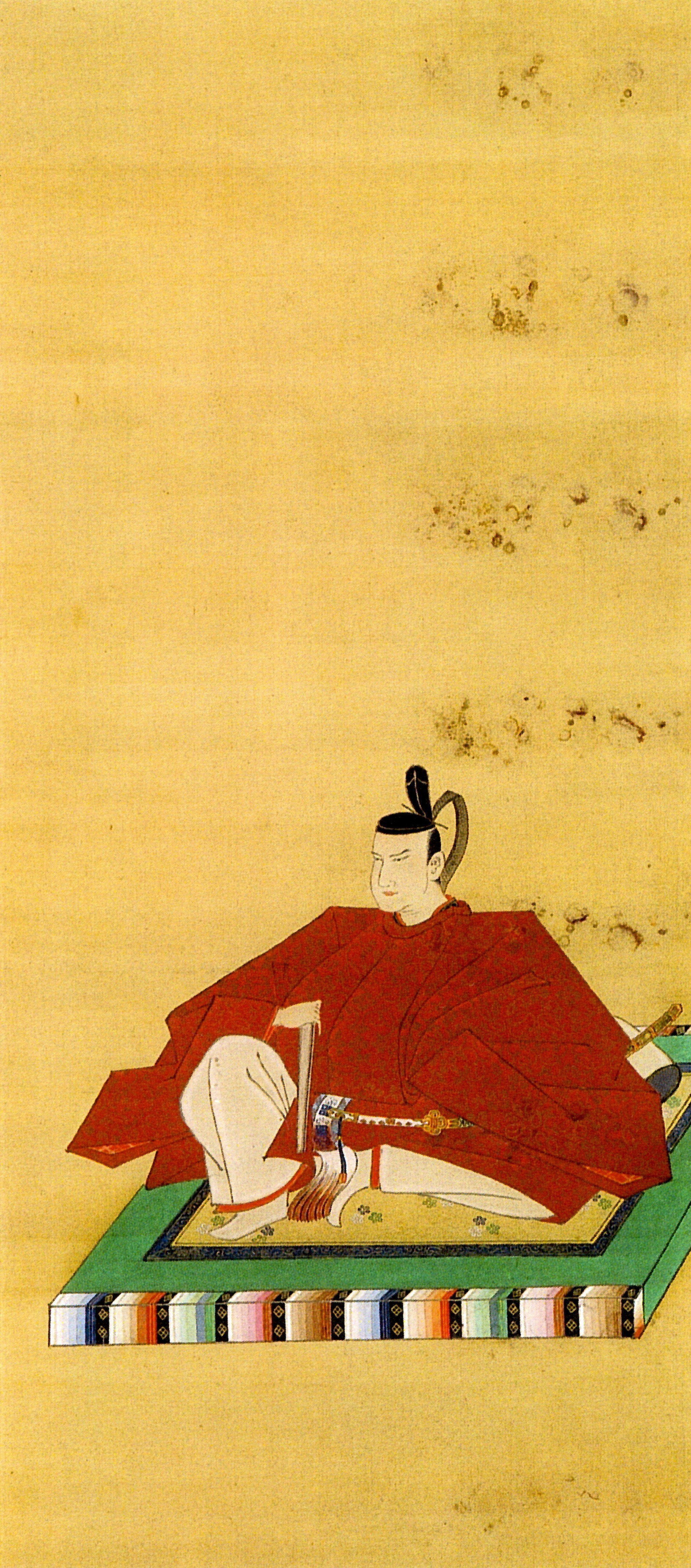 京極高矩の肖像。